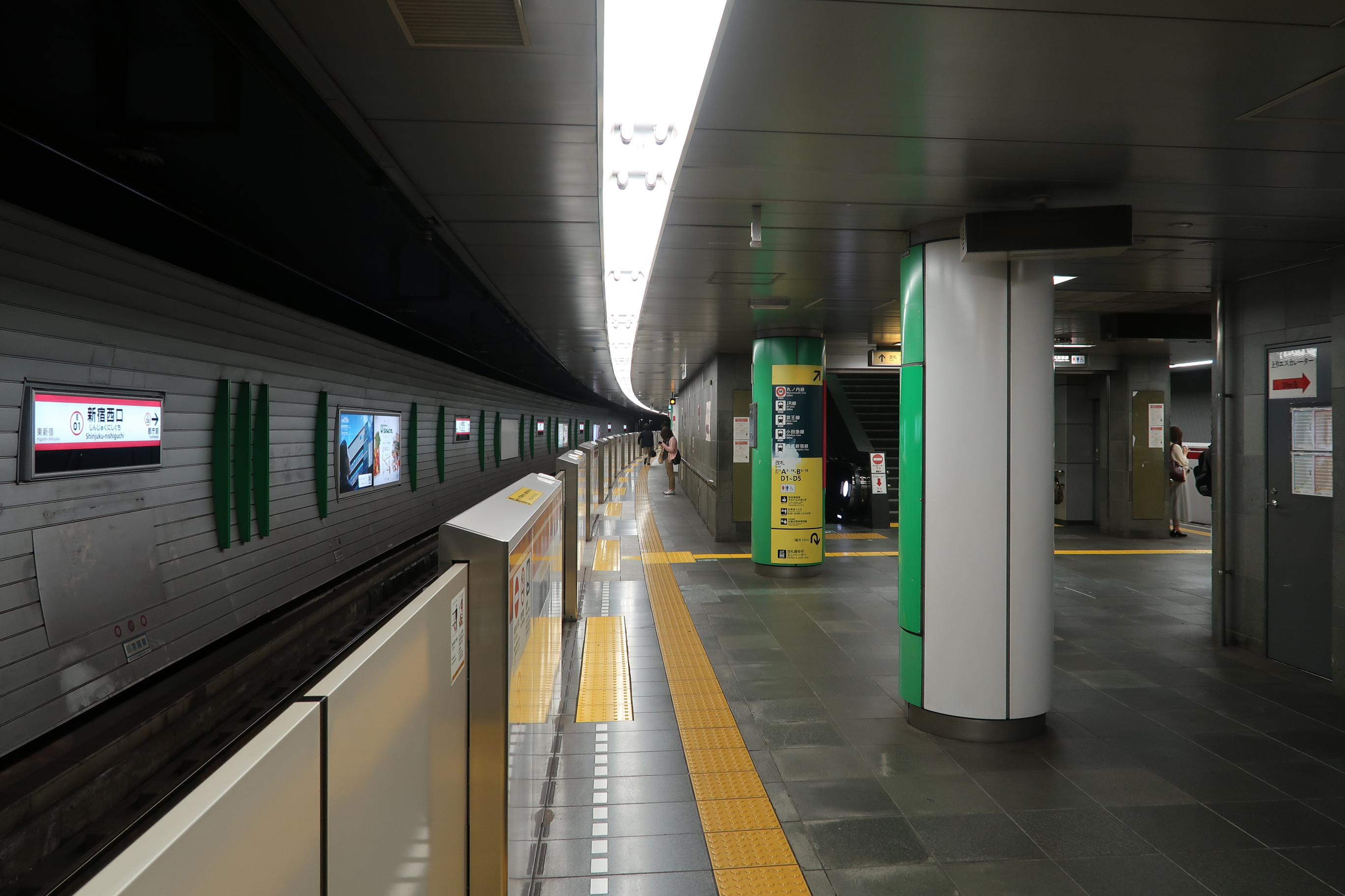 Shinjuku-Nishiguchi Station